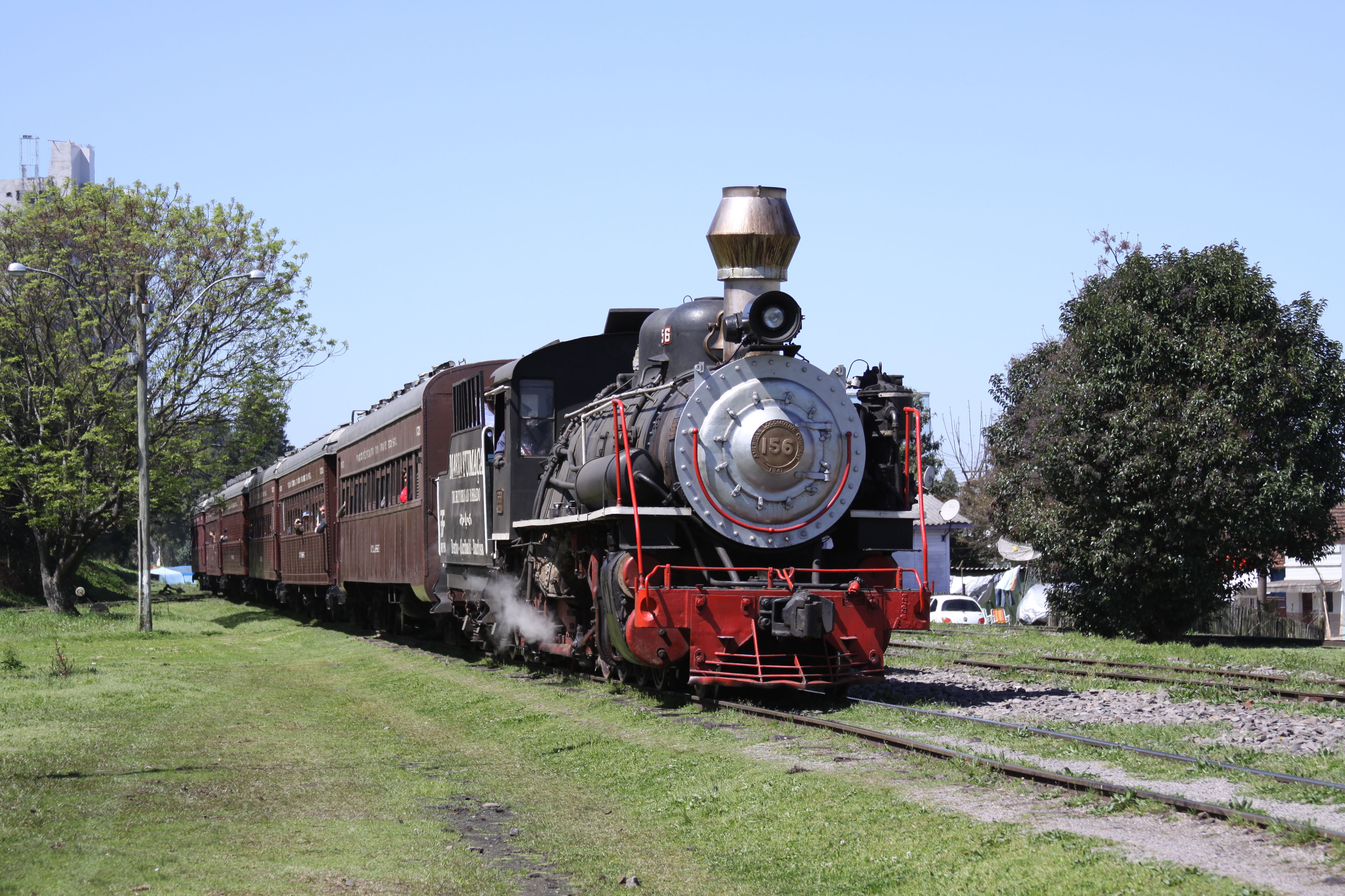 Locomotiva American Locomotive Company - 156-5M - Mikado - 1941 chegando de volta em Bento Gonçalves